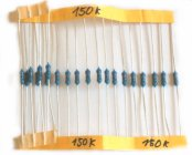 Rezistor.